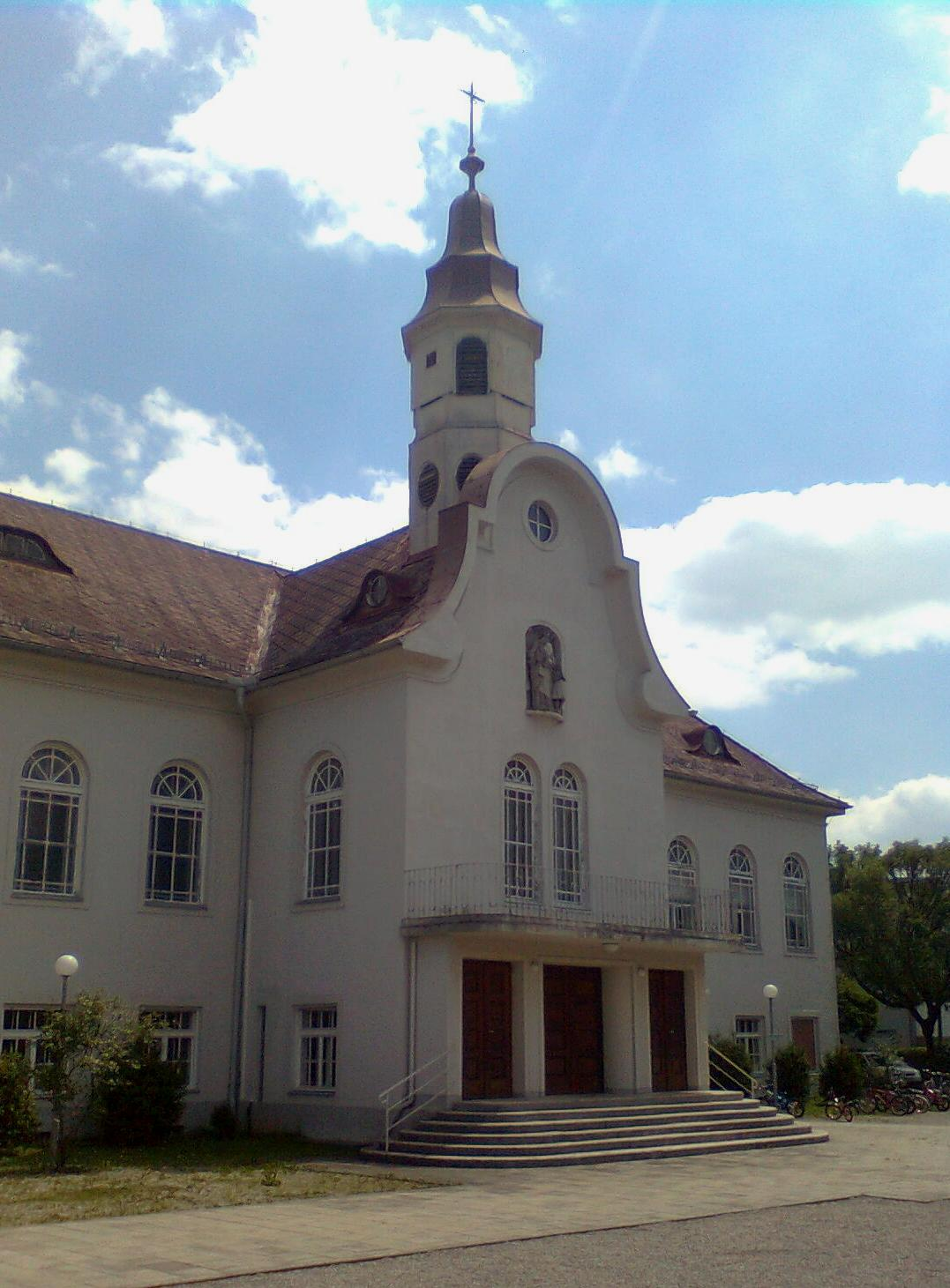 1931 erbaute Notkirche gegenüber der Grazer Schutzengelkirche